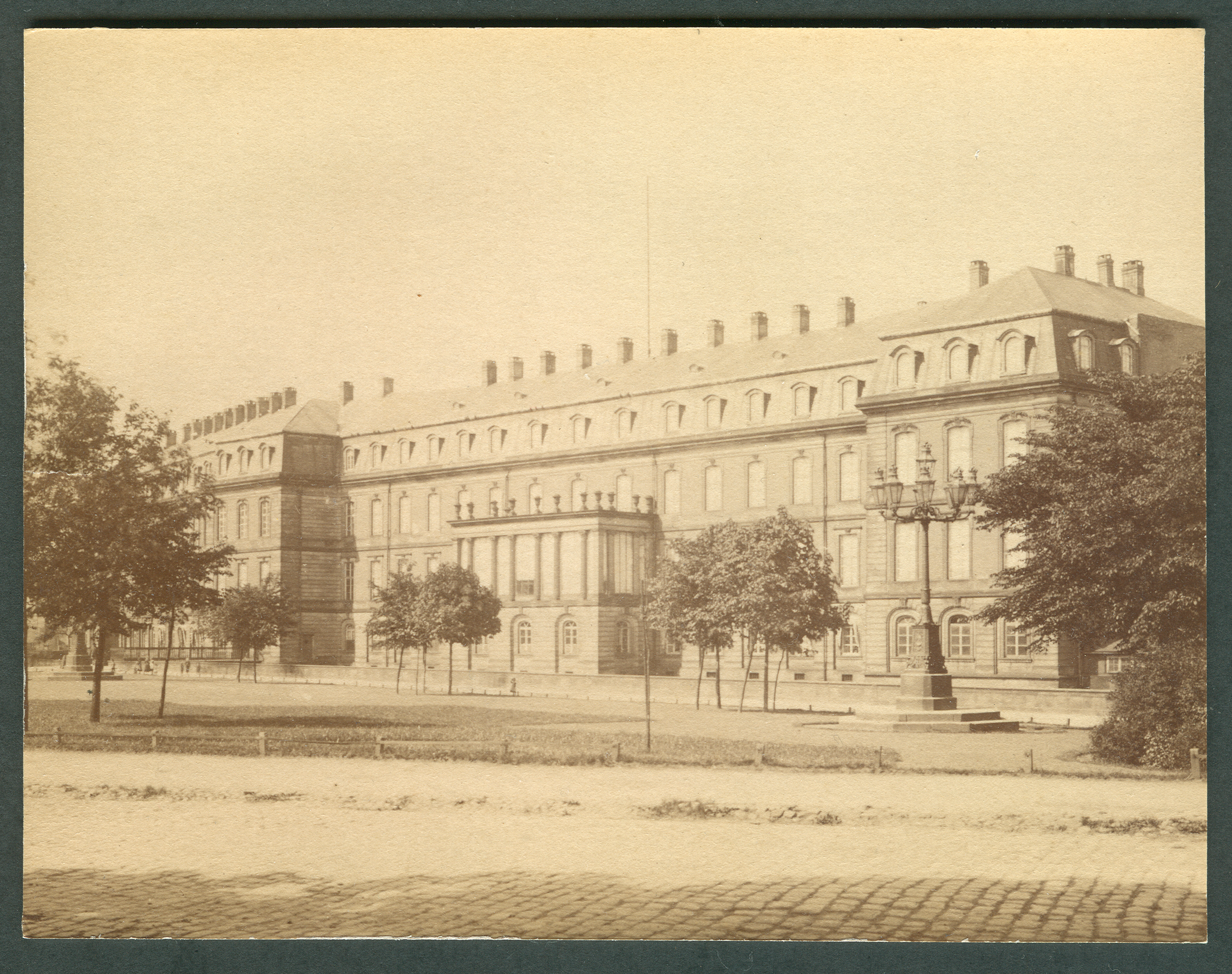 Original-Abzug eines Fotos auf Albumin-Papier; Original gestiftet von Ludwig Hoerner für Wikimedia Commons